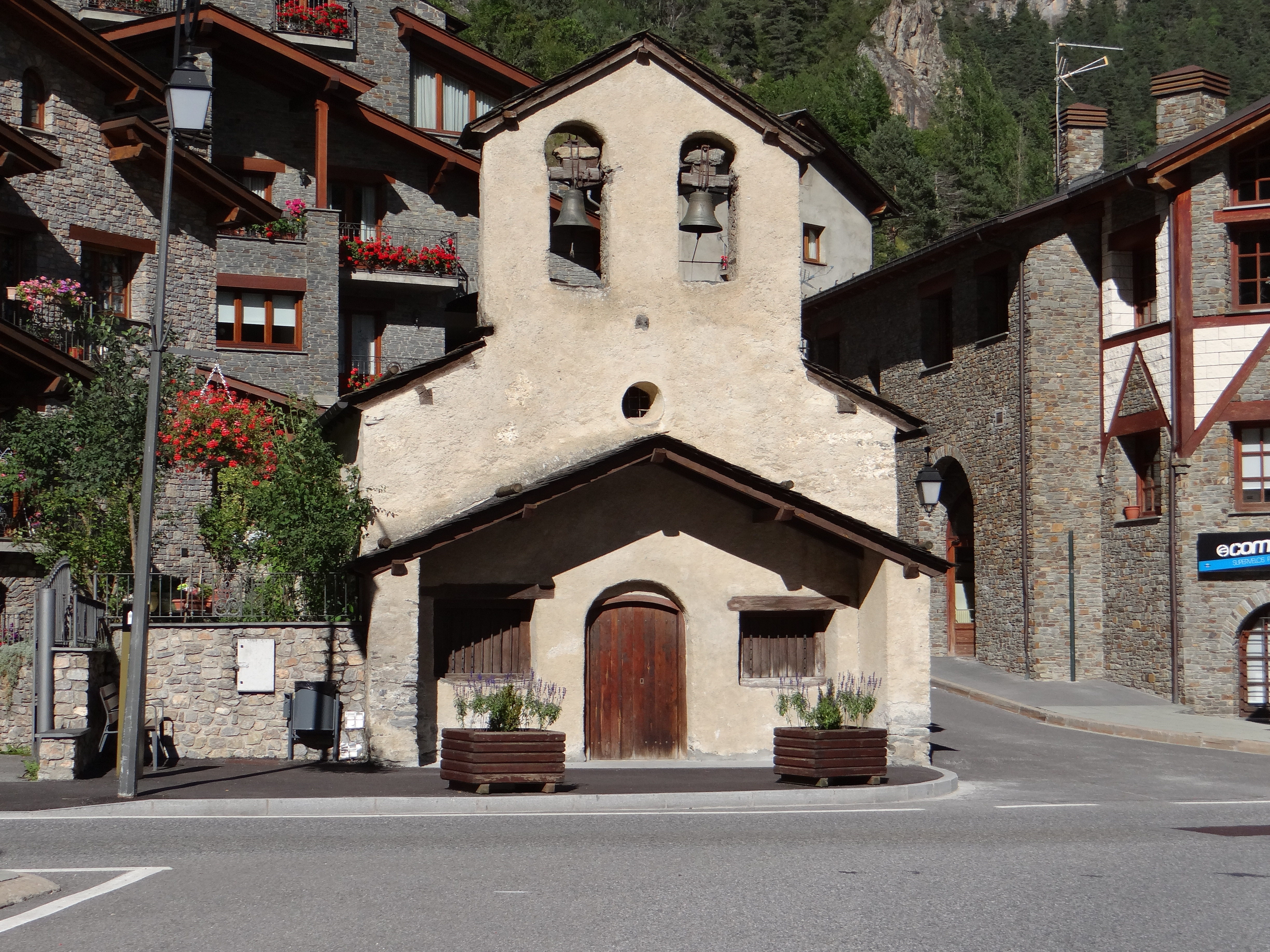 Església de Sant Romà d'Erts